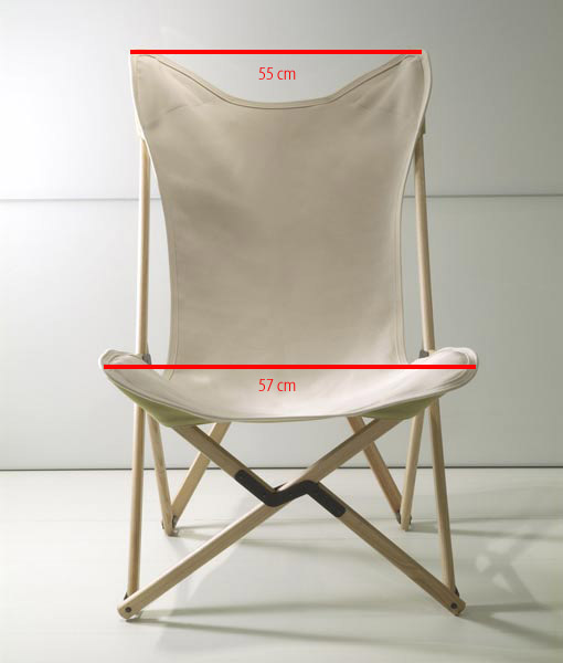 Io sono l'autore dell'immagine. Rilasciata secondo le Creative Commons 2.5. L'uso prevede citare la fonte e l'autore. Sedia Tripolina, vista frontale.